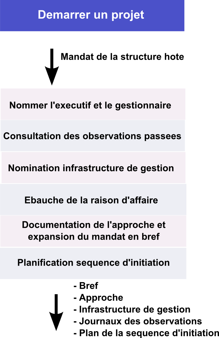 Processus PRINCE2 demarrer un projet